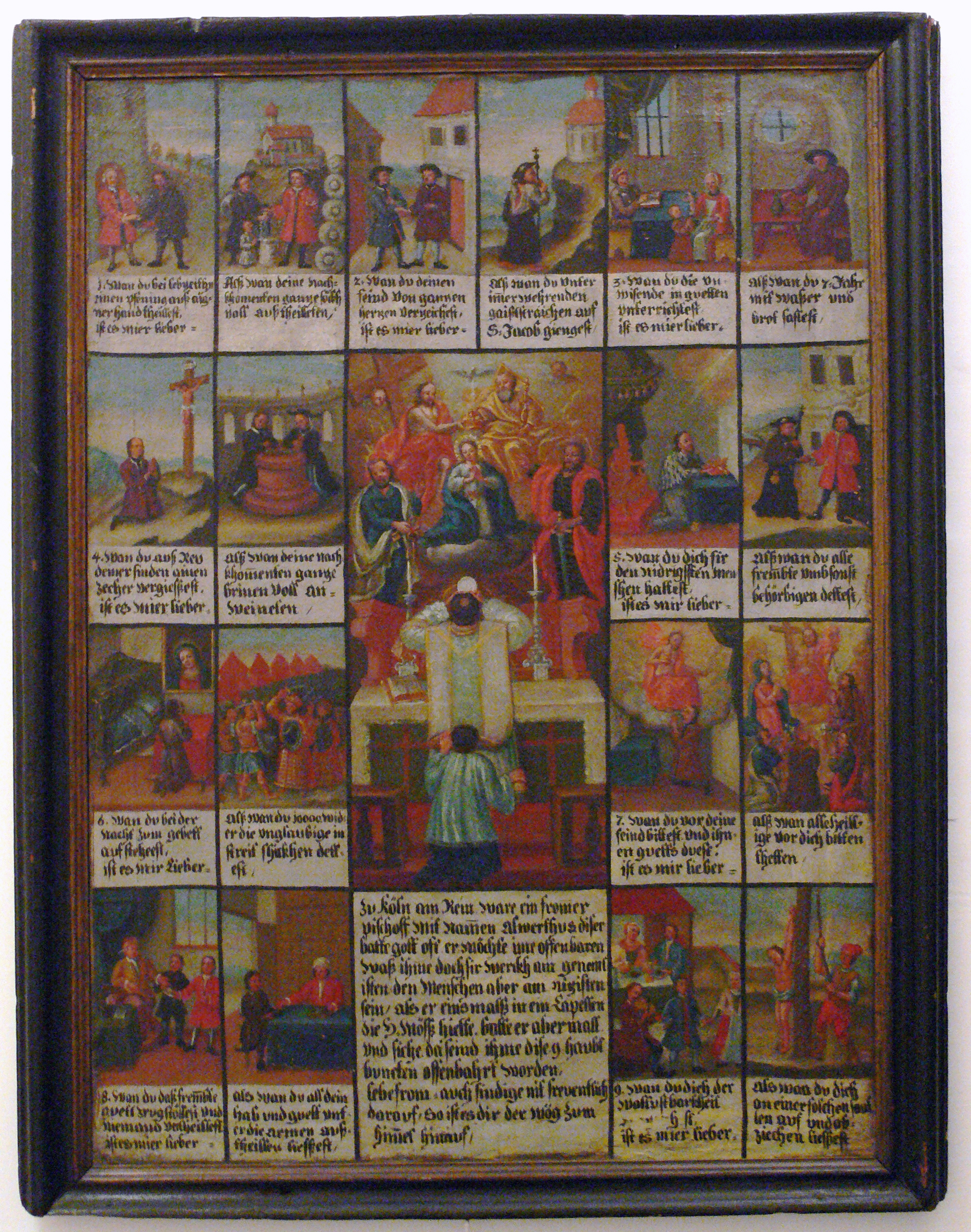 Albertitafel, Öl auf Leinwand, Tirol um 1750 (Albertus Magnus offenbaren sich die neun Punkte zur Führung eines gottgefälligen Lebens) Wien, Österreichisches Museum für Volkskunde, ÖMV-Inv. Nr. 26.465